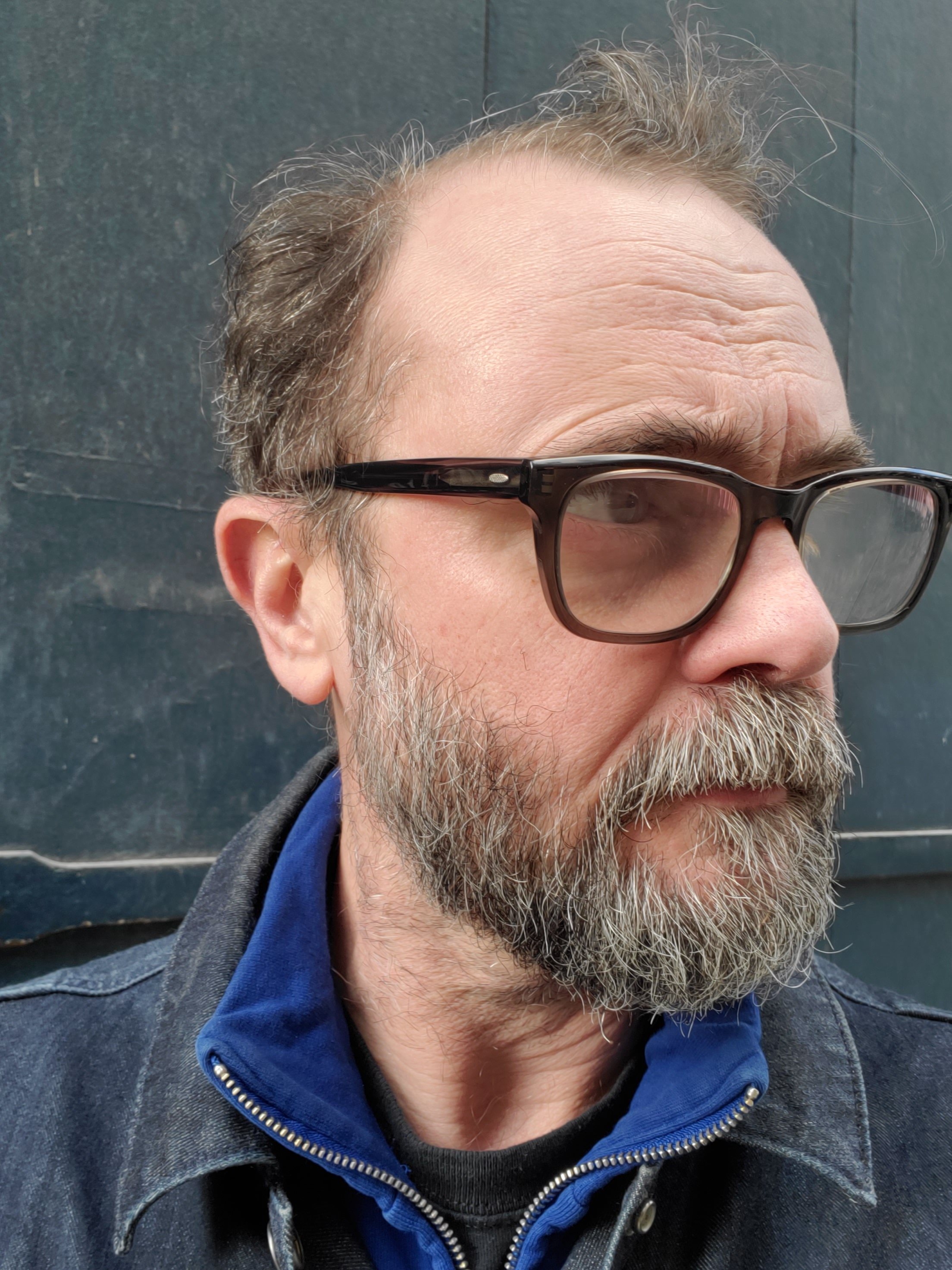 photo d'Eric Berger à Luchon en 2016